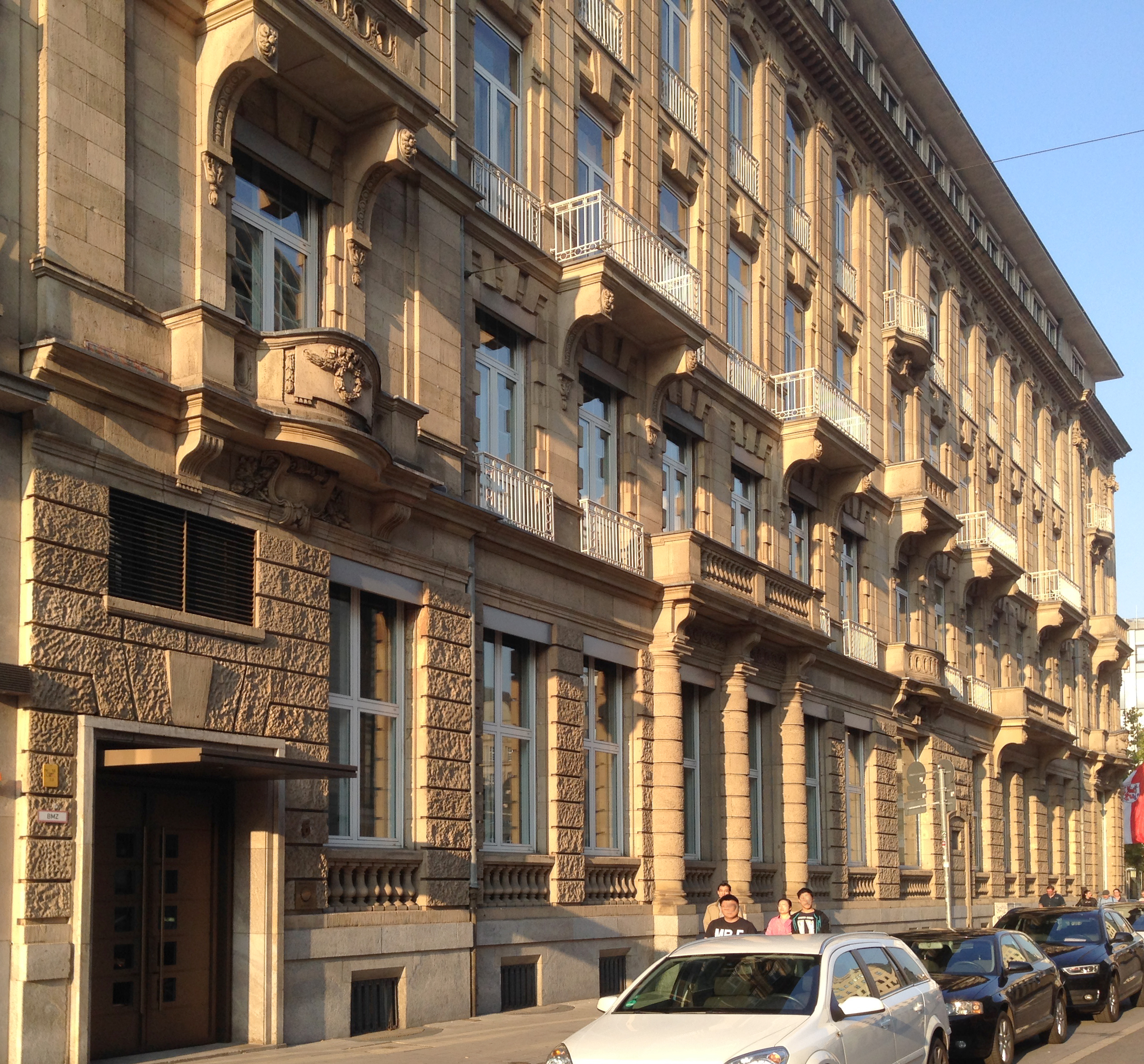 Gebäude des Steigenberger Park-Hotel, Seitenansicht Elberfelder Straße 6